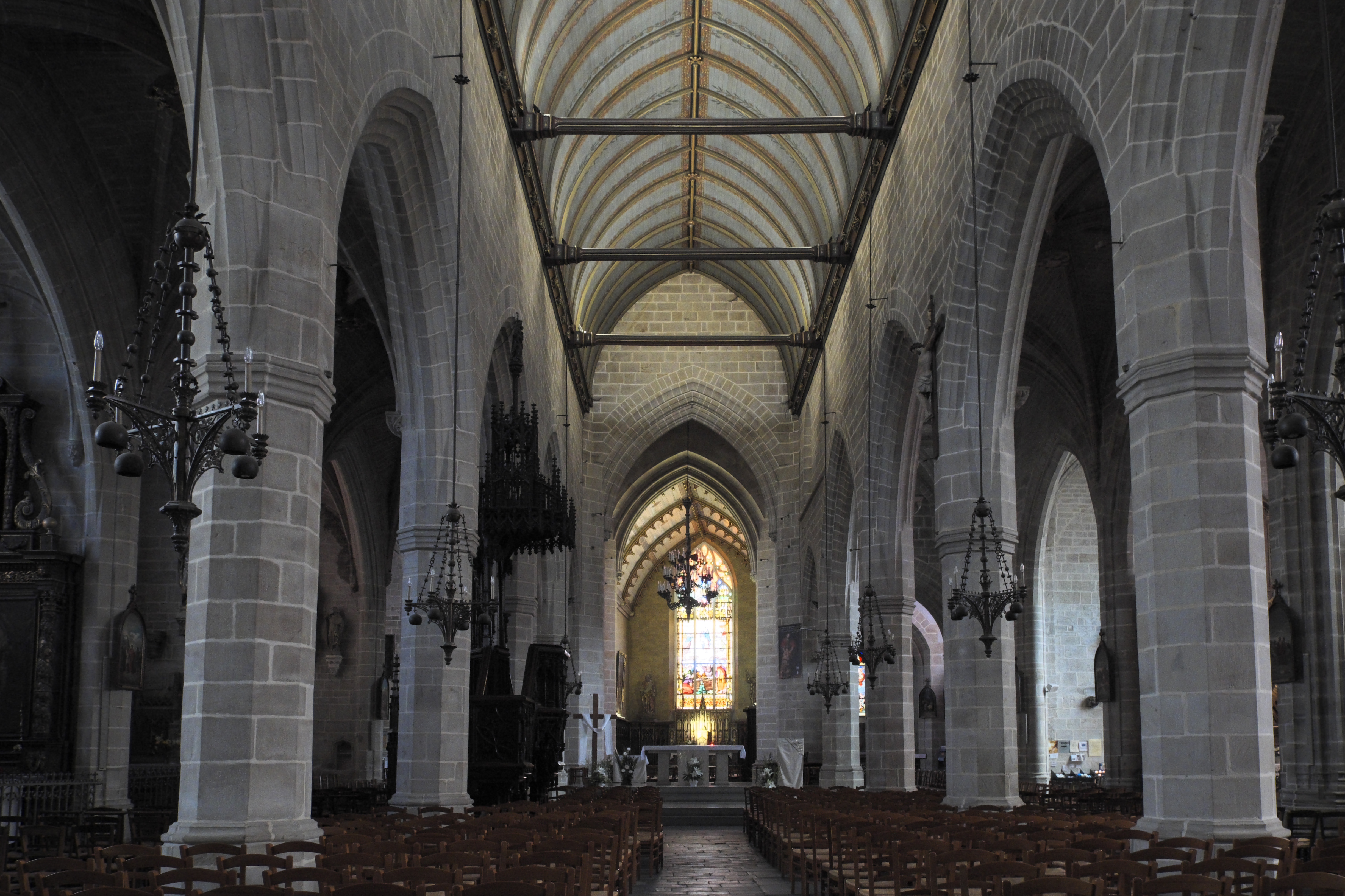 Katholische Pfarrkirche Notre-Dame in Vitré im Département Ille-et-Vilaine (Region Bretagne/Frankreich), Innenraum